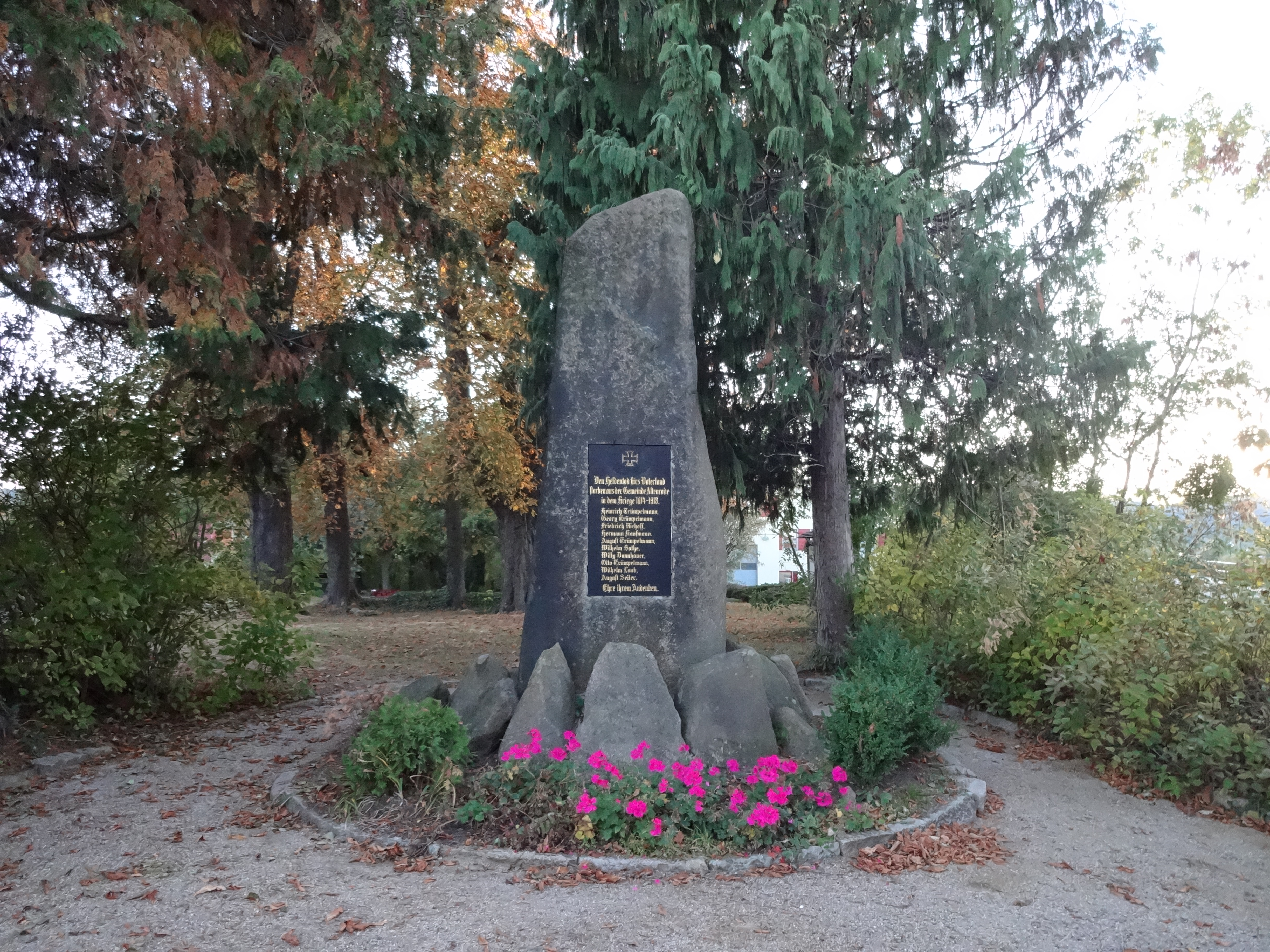 Kriegerdenkmal für die Gefallenen des Ersten Weltkriegs an der Friedensstraße in Darlingerode